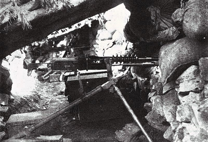 岔溝東北方高地の堡塁内にて撮影